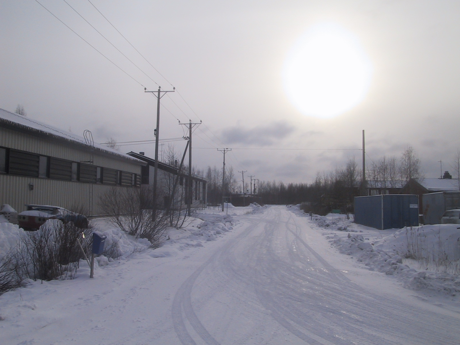 Hakamaa, village in Kempele